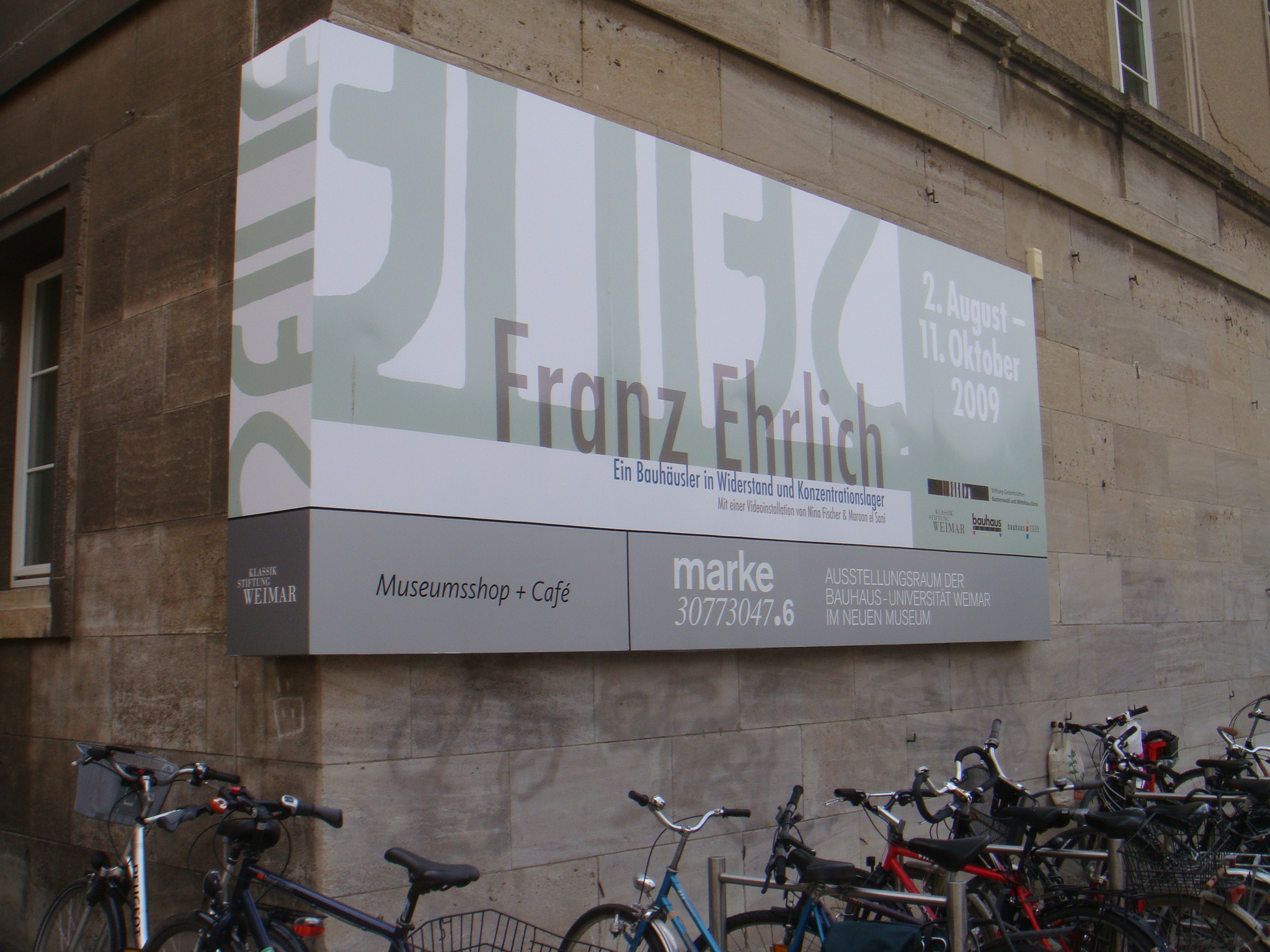 Weimar Museum für neue Kunst – Plakat der Franz Ehrlich-Ausstellung